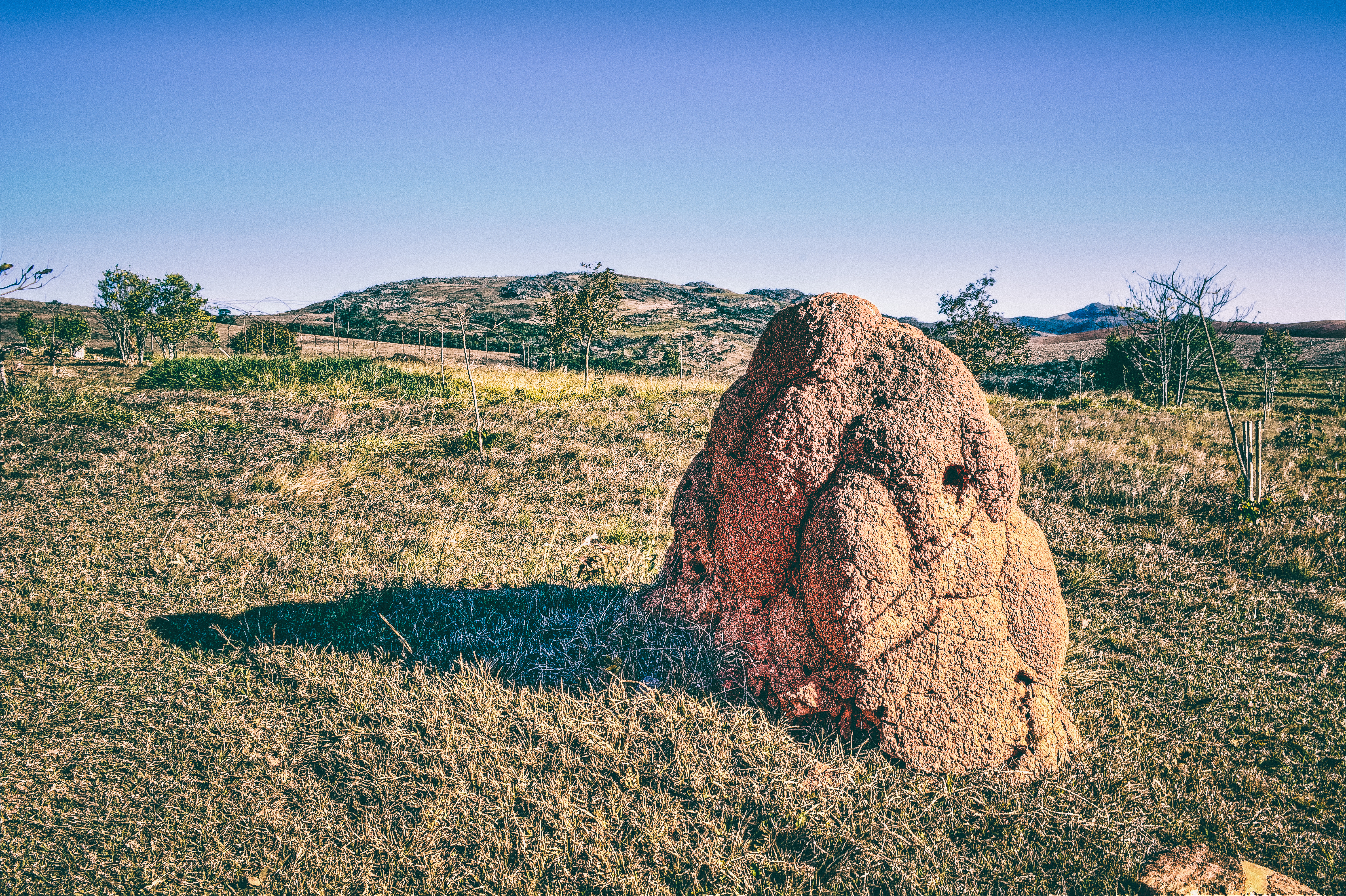 Sobradinho - São Thomé das Letras - MG